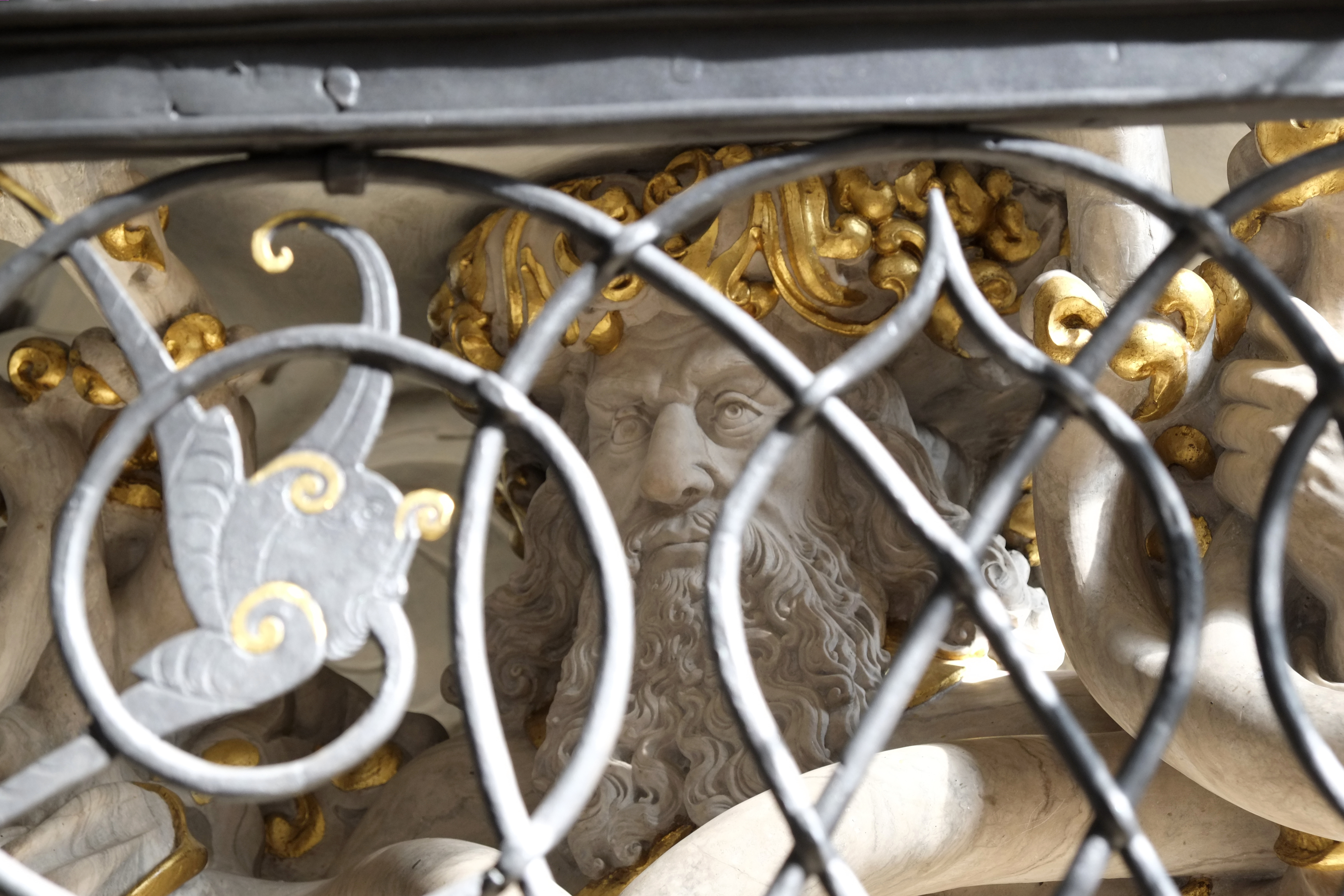 Kanzel in der Wallfahrtskirche Maria im Sand in Dettelbach im Landkreis Kitzingen (Bayern, Deutschland)